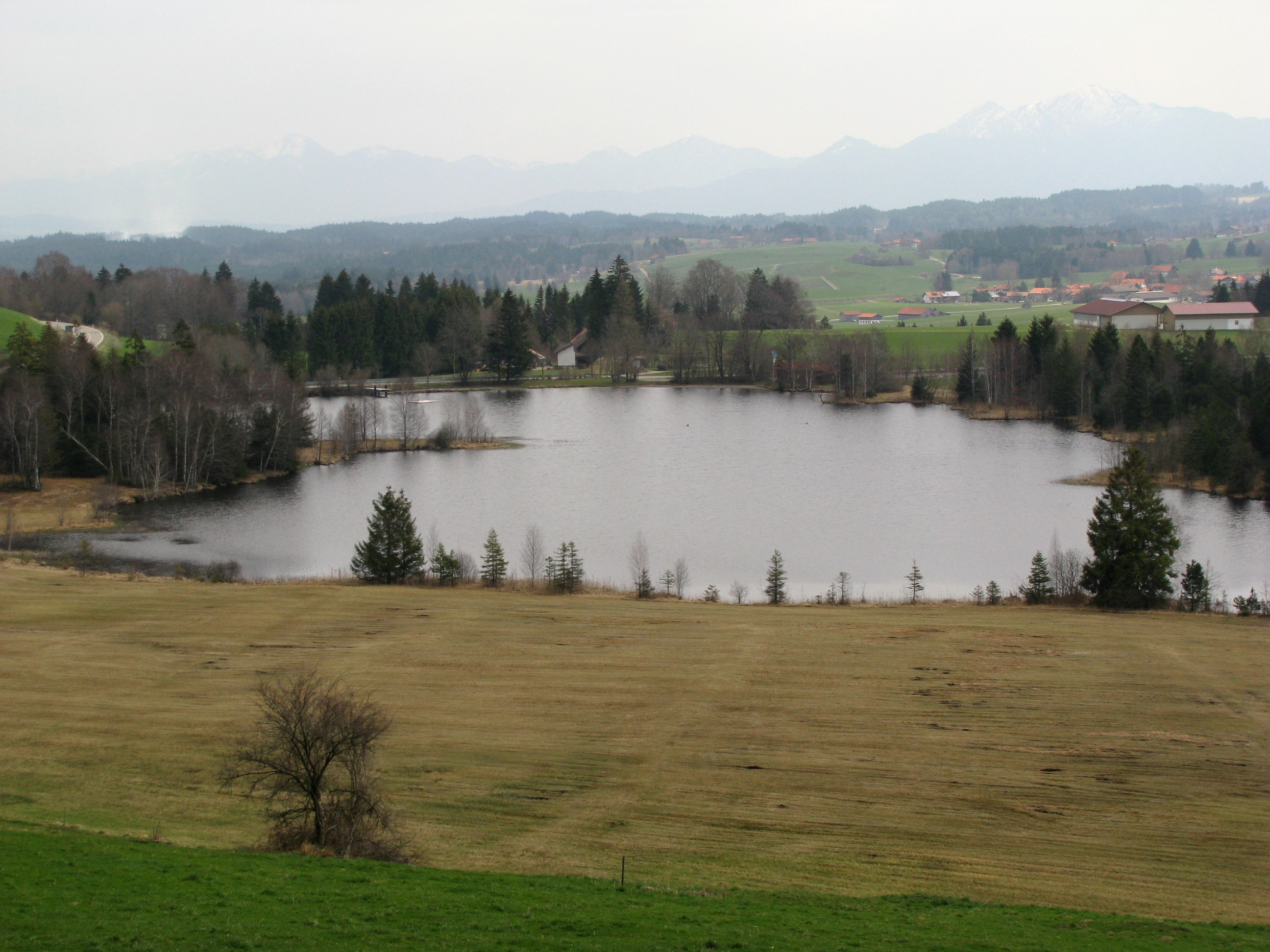 Schwaigsee von Westnordwest